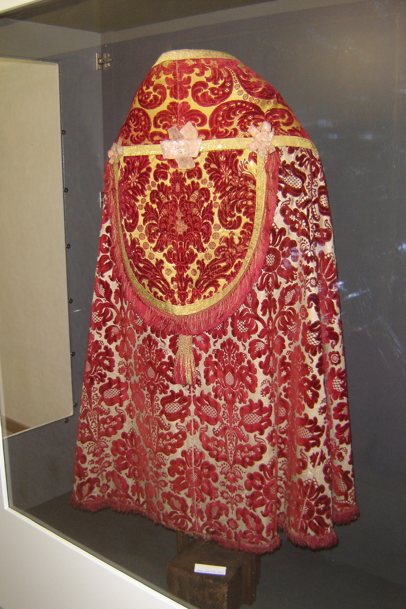 Aperçu de l'exposition d'art sacré